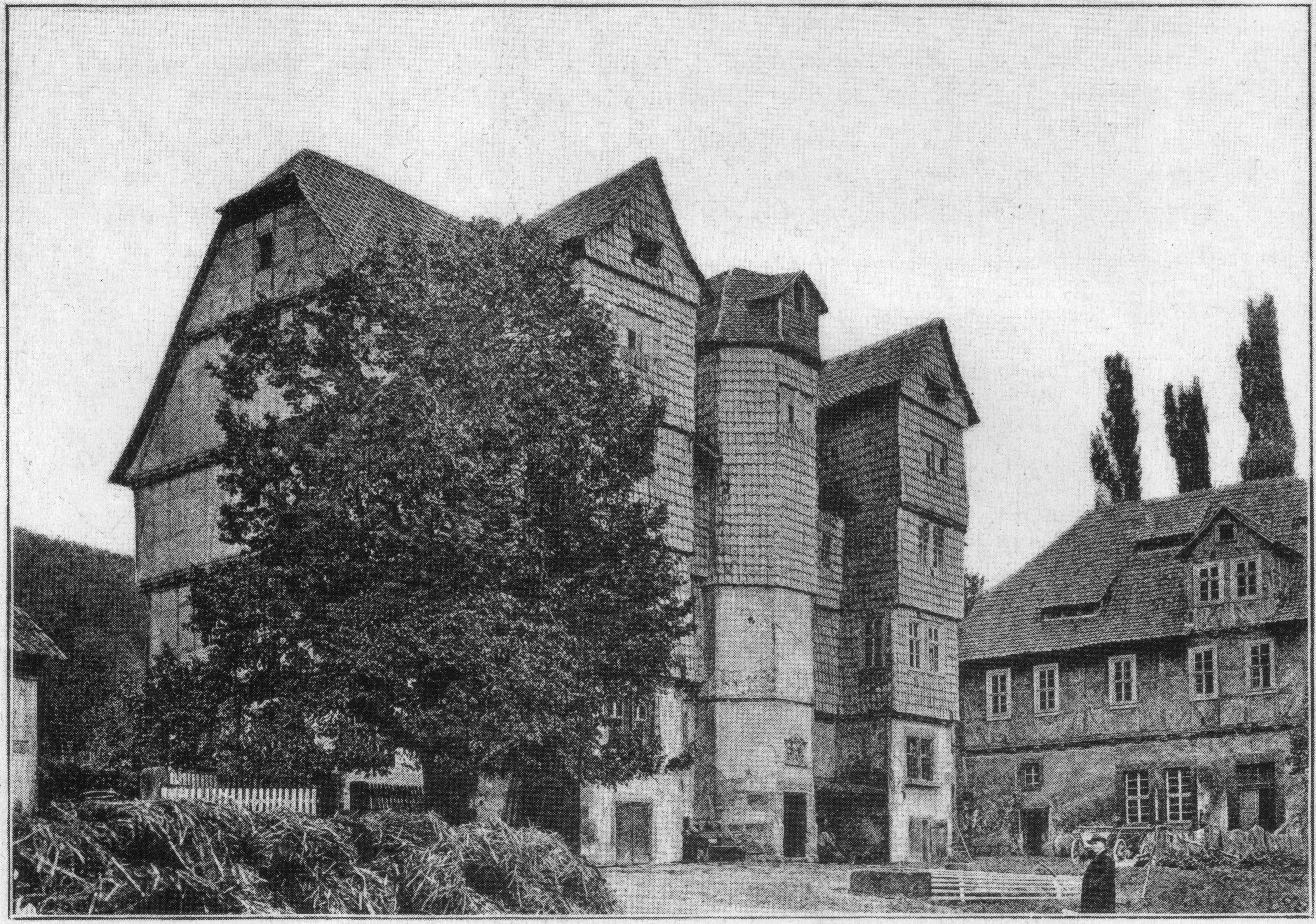 Abb. 321. Edelsitz, Oberstein.